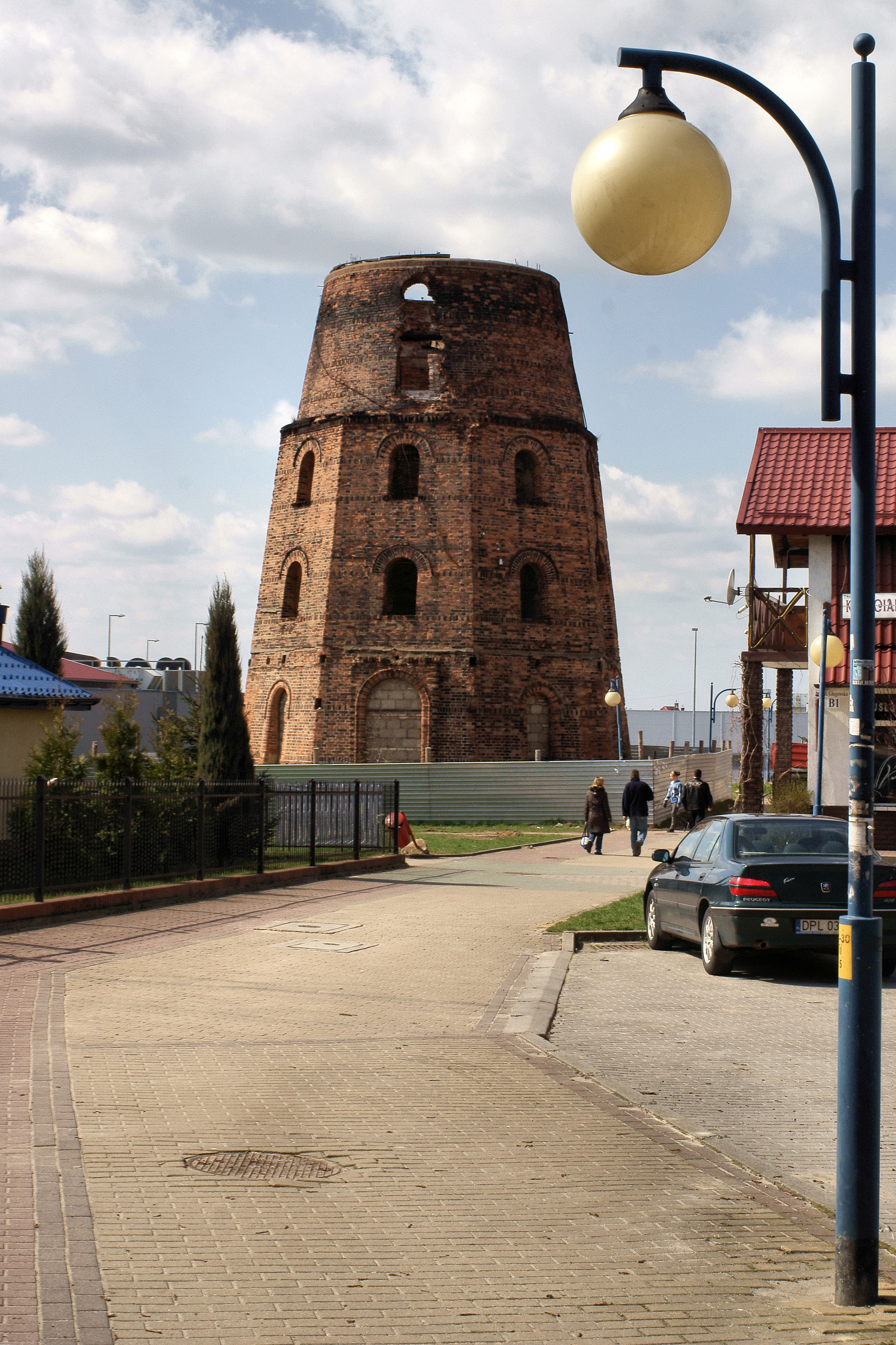 Polkowice, ul. Głogowska 19 - ruiny wiatraka holenderskiego (zabytek nr A/3219/604/L)